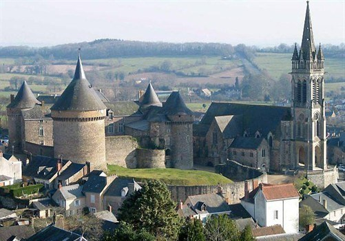 Photo du château et de l'église de Sillé-le-Guillaume, commune de la Sarthe.